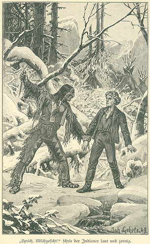 Illustration von Johannes Gehrts in Bob der Fallensteller. Eine Erzählung aus dem Westen Nordamerikas. Für die reifere Jugend von Friedrich J. Pajeken. Mit Abbildungen nach Zeichnungen von Joh. Gehrts. Siebente Auflage. Leipzig, Ferdinand Hirt & Sohn. 1909. Die vierte Auflage von 1903 enthielt die gleichen Illustrationen.